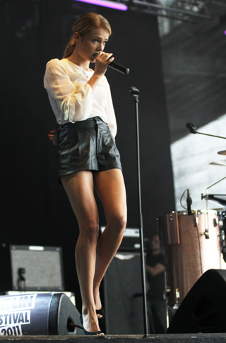 florrie